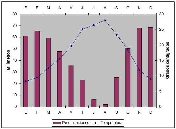 Climograma de Valenzuela. Basado en las precipitaciones de los años 1958 a 1984 en Valenzuela y las temperaturas de Baena (Noviembre de 2000 a julio de 2019). Los datos de las precipitaciones están recogidas de los cuadernos del corresponsal de la Confederación Hidrográfica del Gualdalquivir; los de las temperaturas, de la Estación Meteorológica de Baena